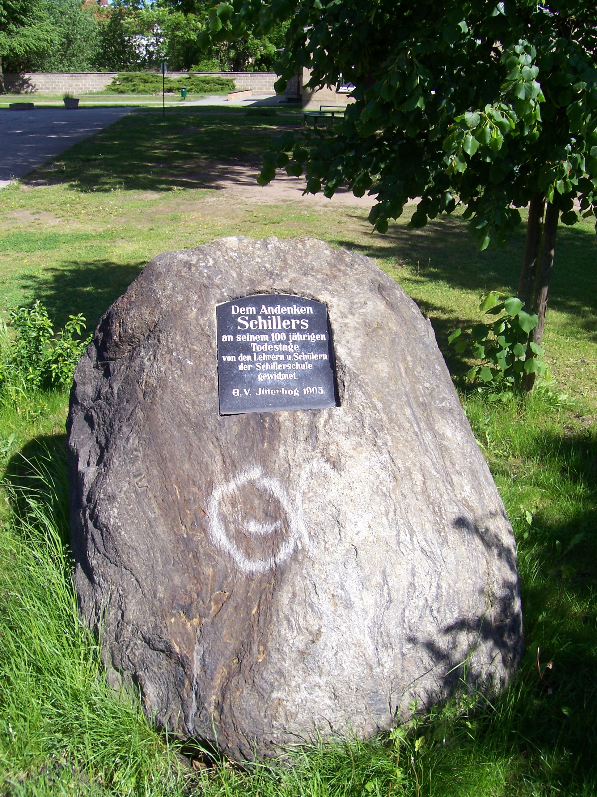 Gedenkstein zum 100. Todestag Friedrich Schillers. Inschrift: Dem Andenken / Schillers / an seinem 100 jährigen / Todestage / von den Lehrern u. Schülern / der Schillerschule / gewidmet. / O. V. Jüterbog 1905